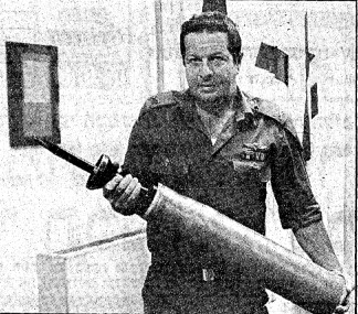 תא"ל עמוס כץ נושא טיל חץ 2